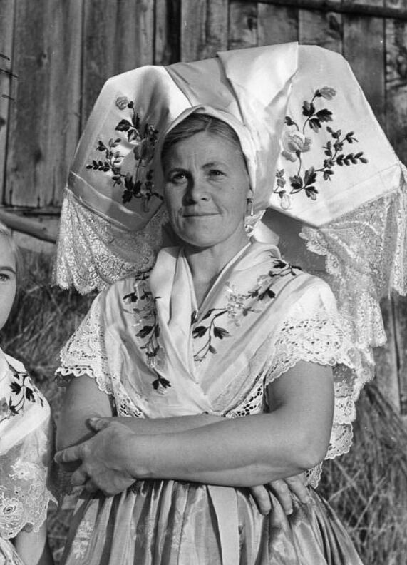 Spreewaldbäuerin ADN-ZB/ Illus Spreewaldbäuerin um 1948